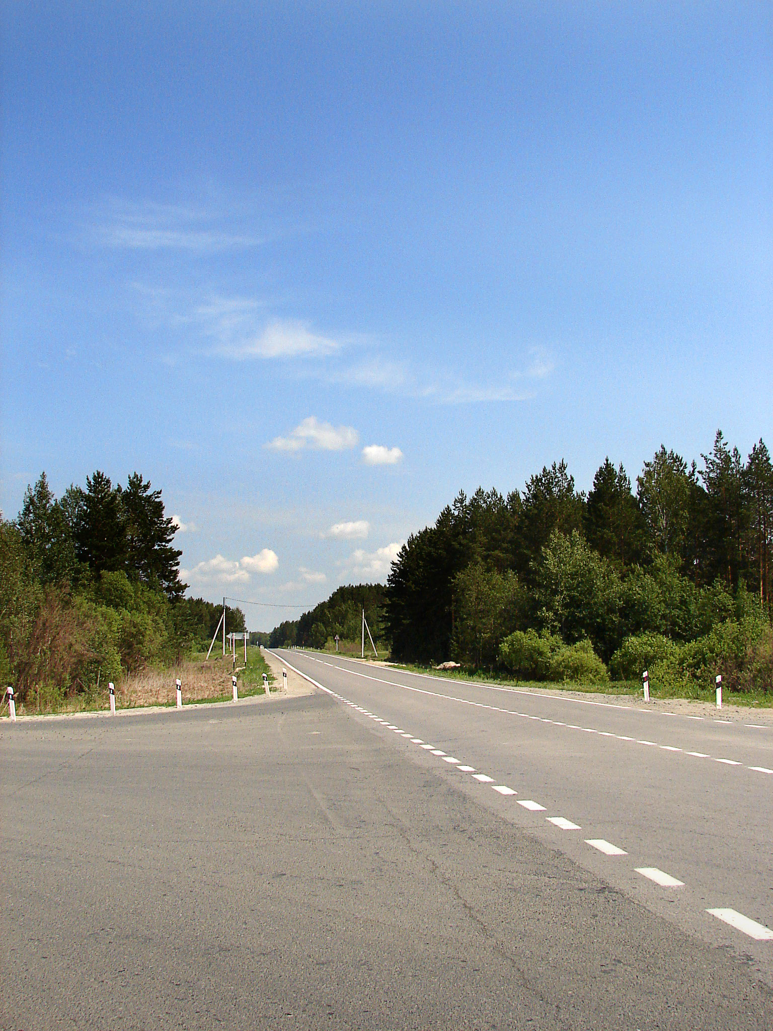 Трасса на Винзили 2008г.